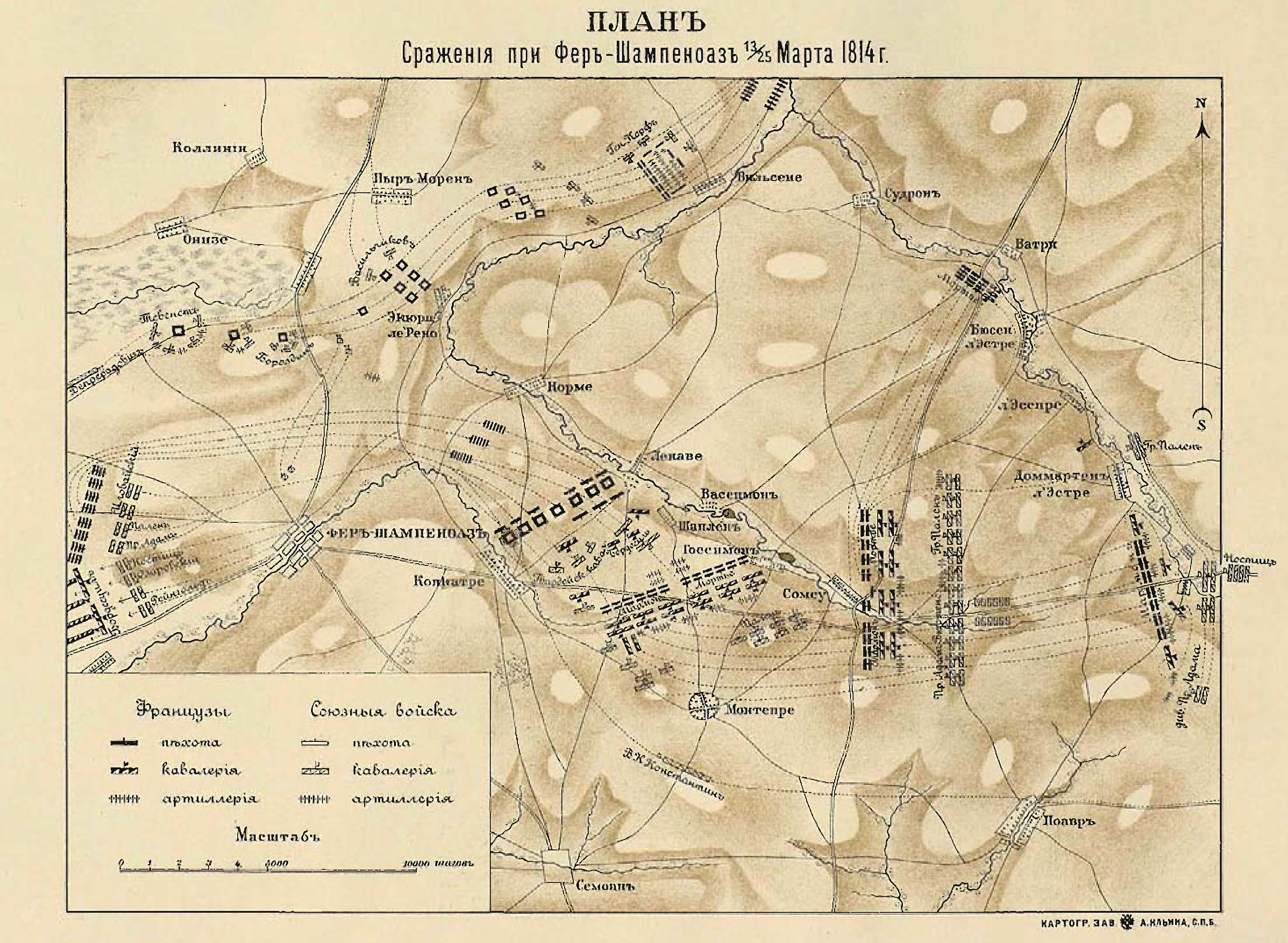 План сражения при Фер-Шампенуазе